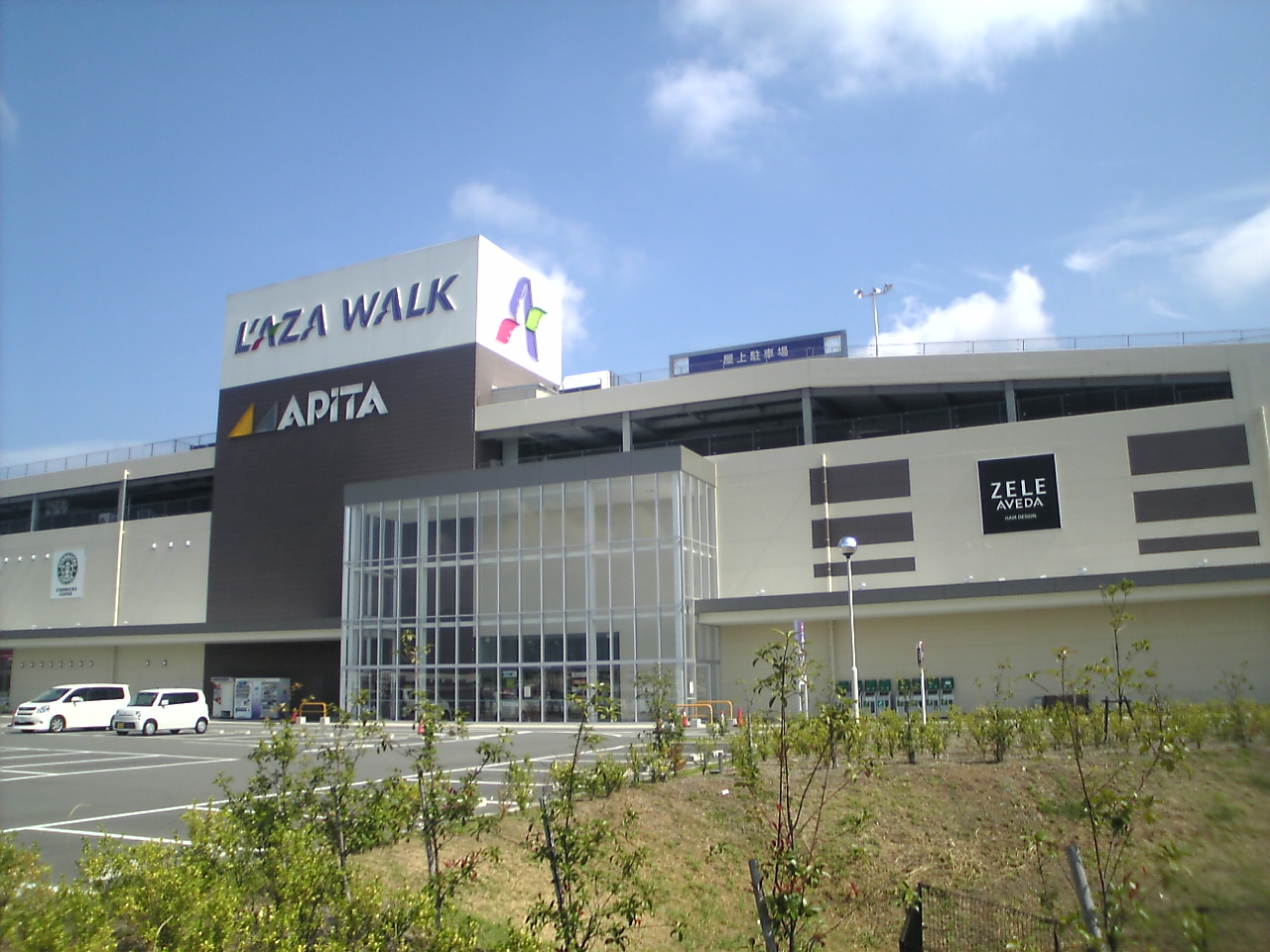 店舗外観写真